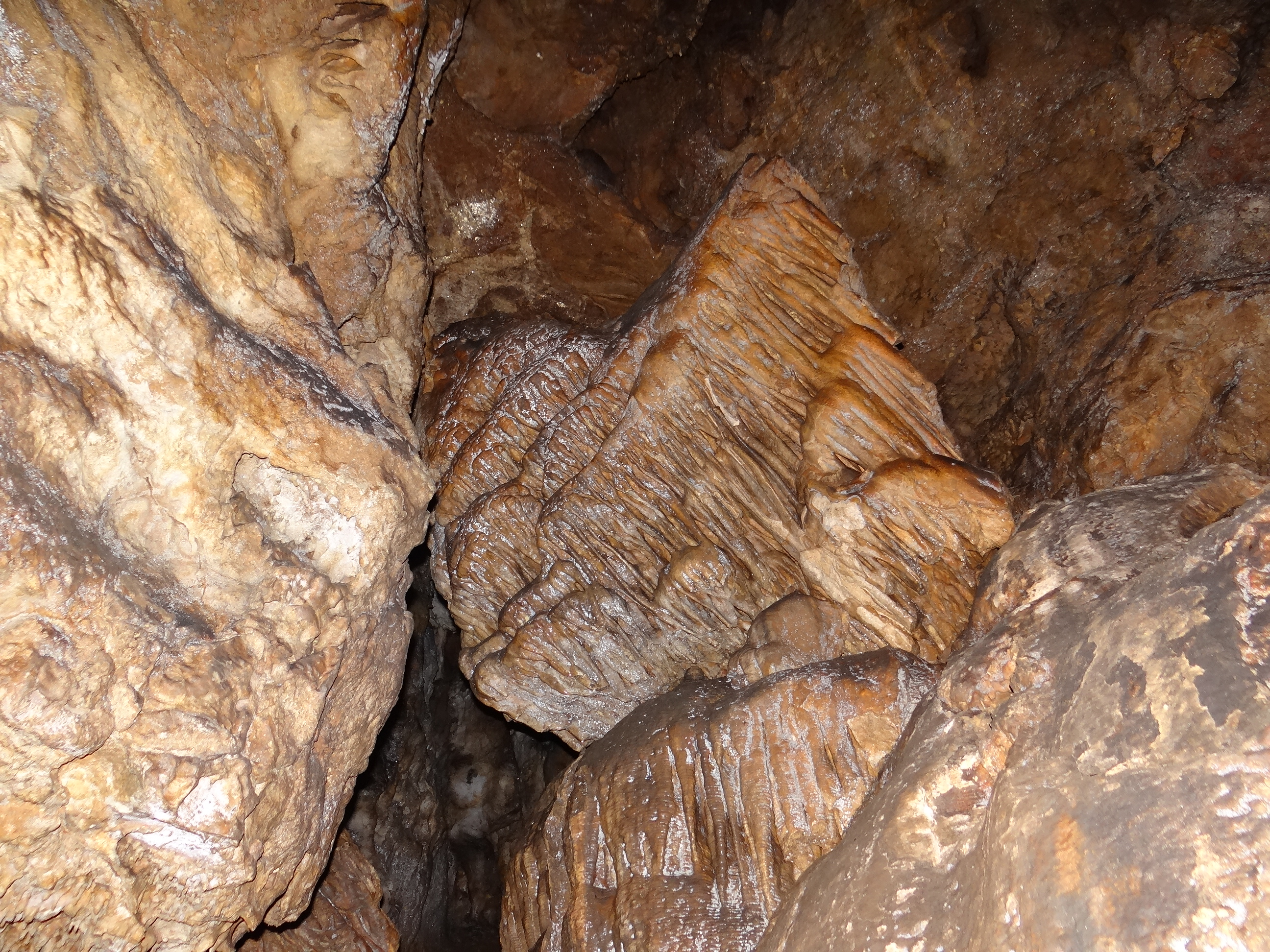 Jaskinia Racławicka. Zaklinowany głaz pokryty żebrami naciekowymi, powstałymi jeszcze przed jego opadnięciem od ściany